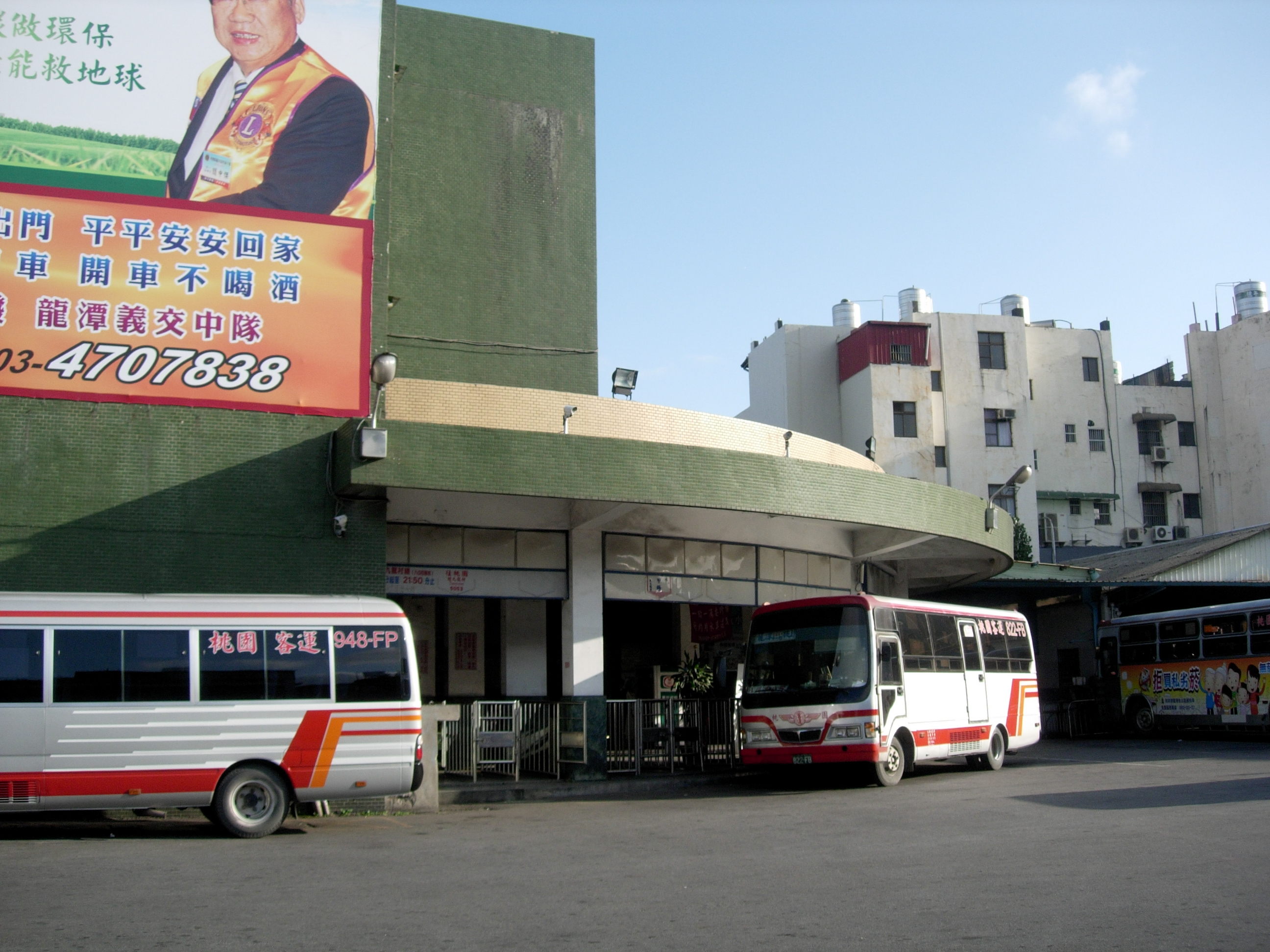 中文（台灣）: 桃園客運龍潭站外觀